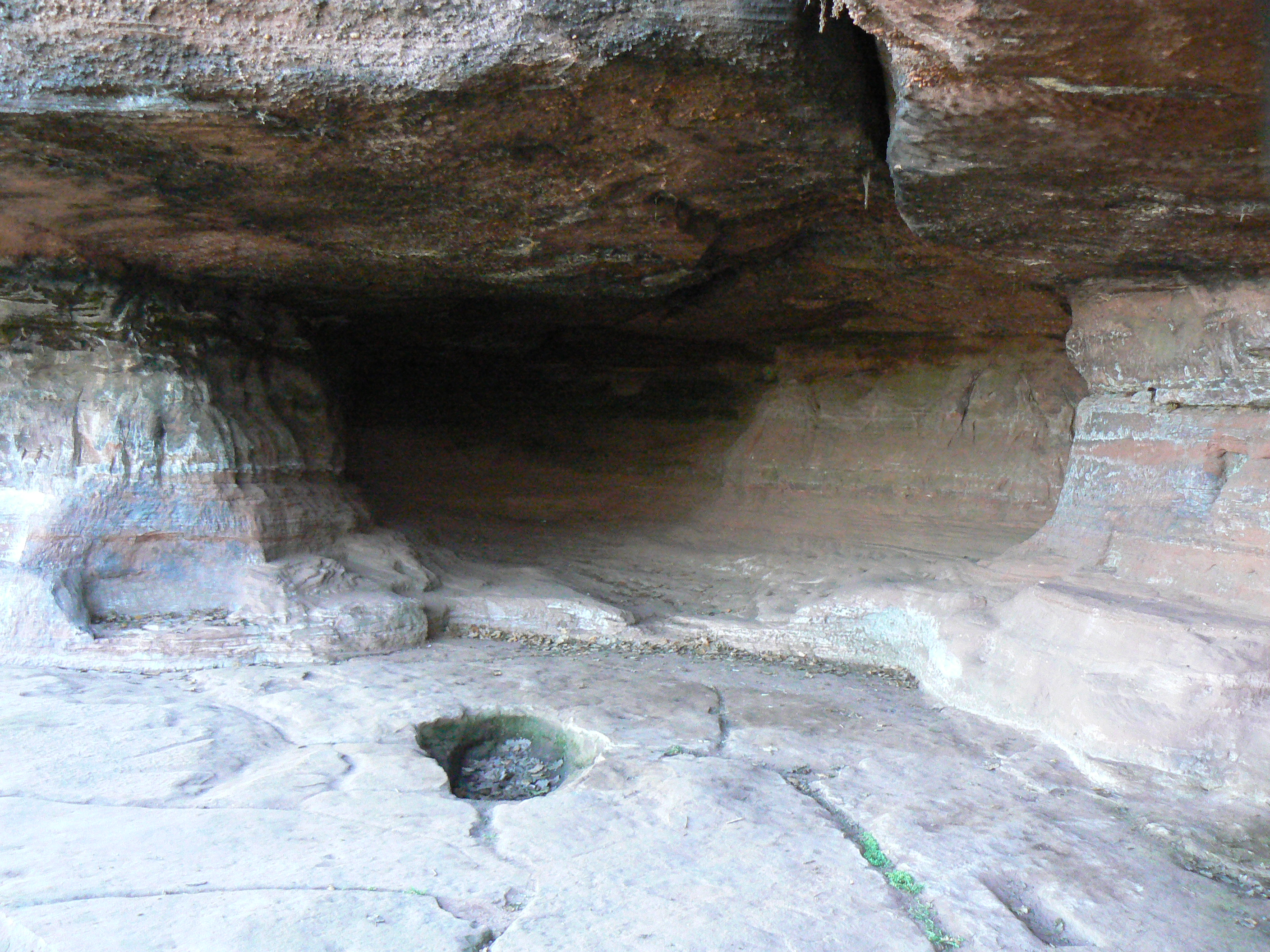 Mt St Michel, la grotte aux fées vue de l'interieur(bas_rhin).